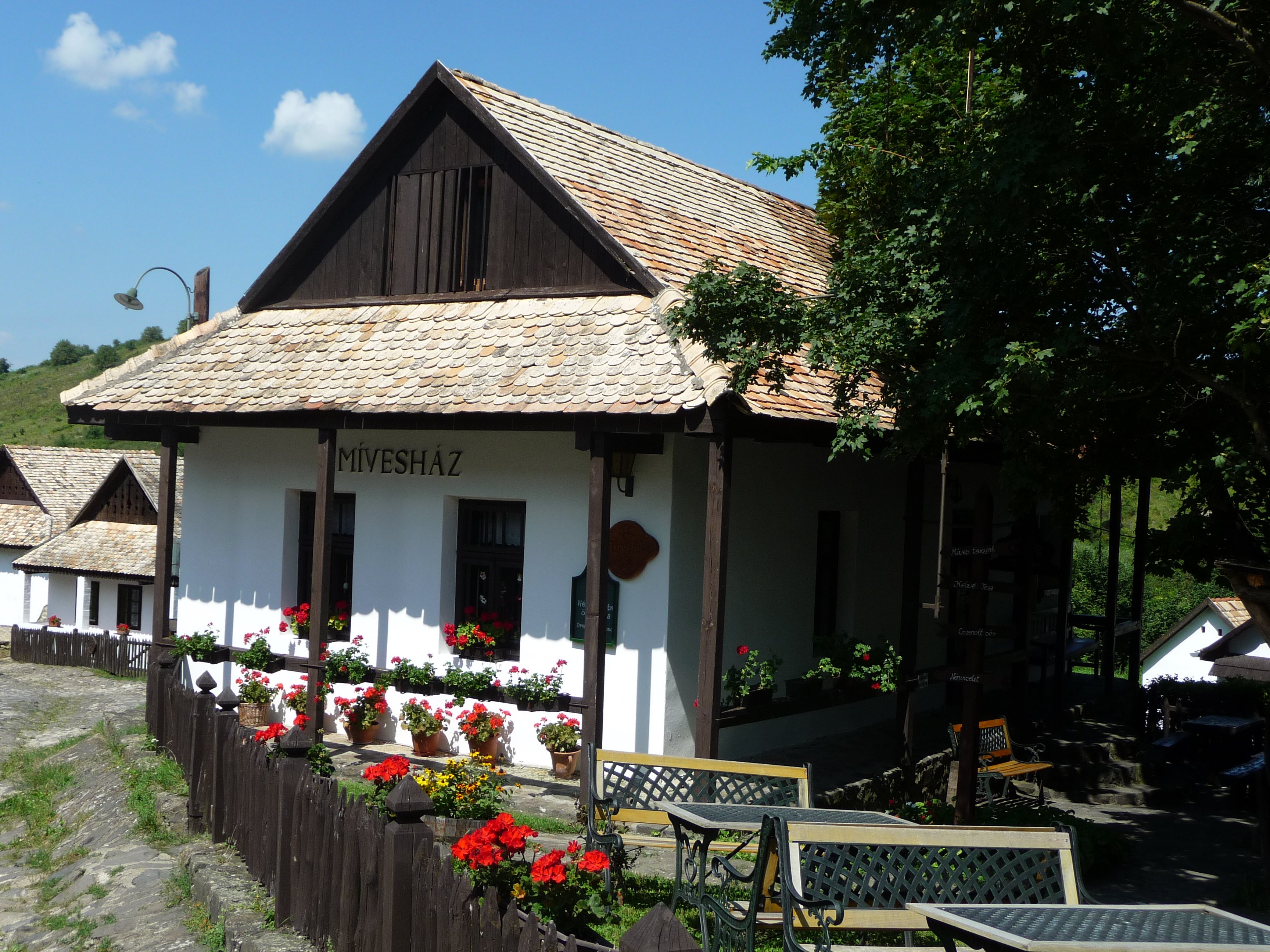 Hollókő, Petőfi u. 4.